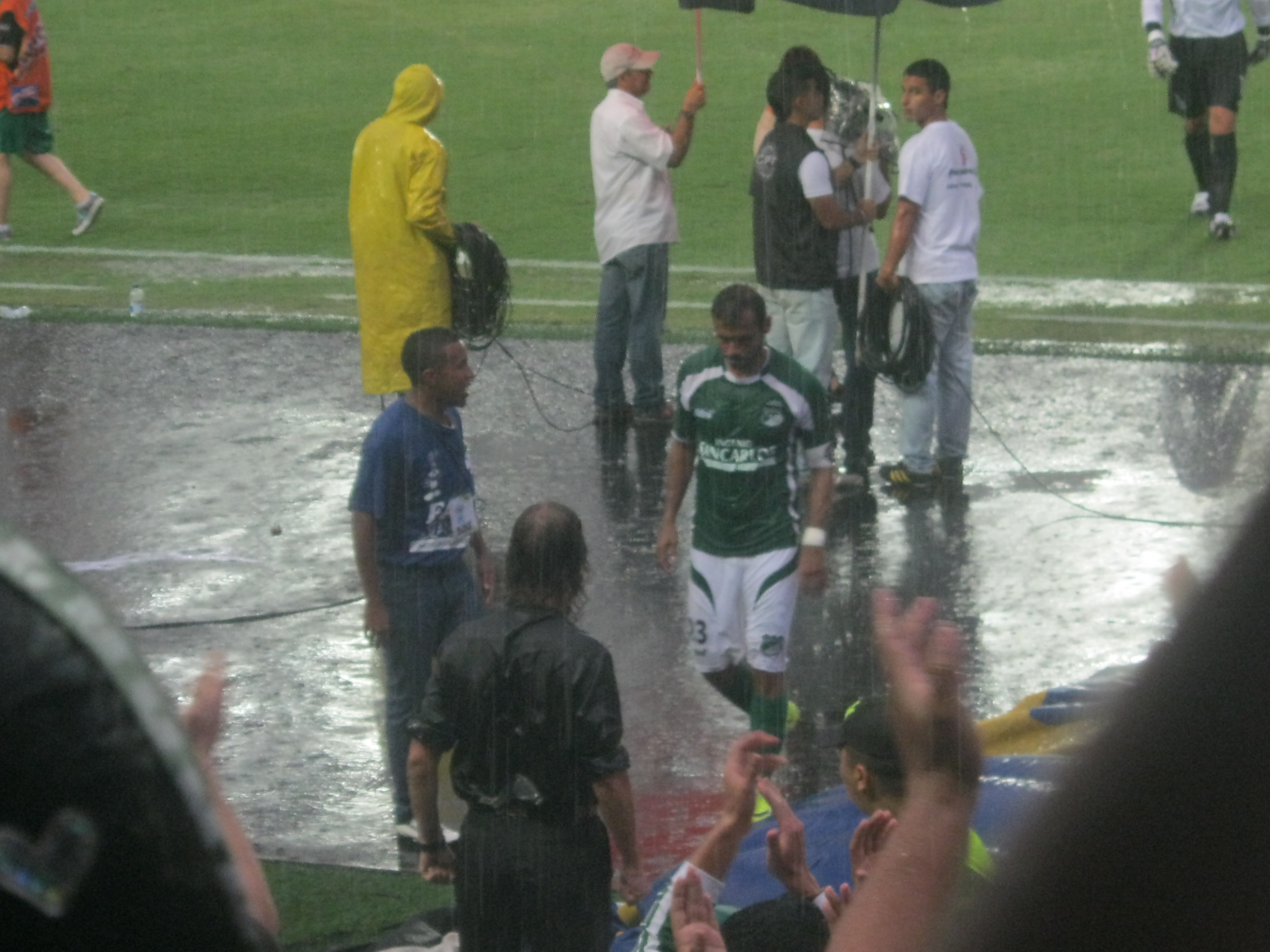 El jugador de fútbol Caracho Domínguez